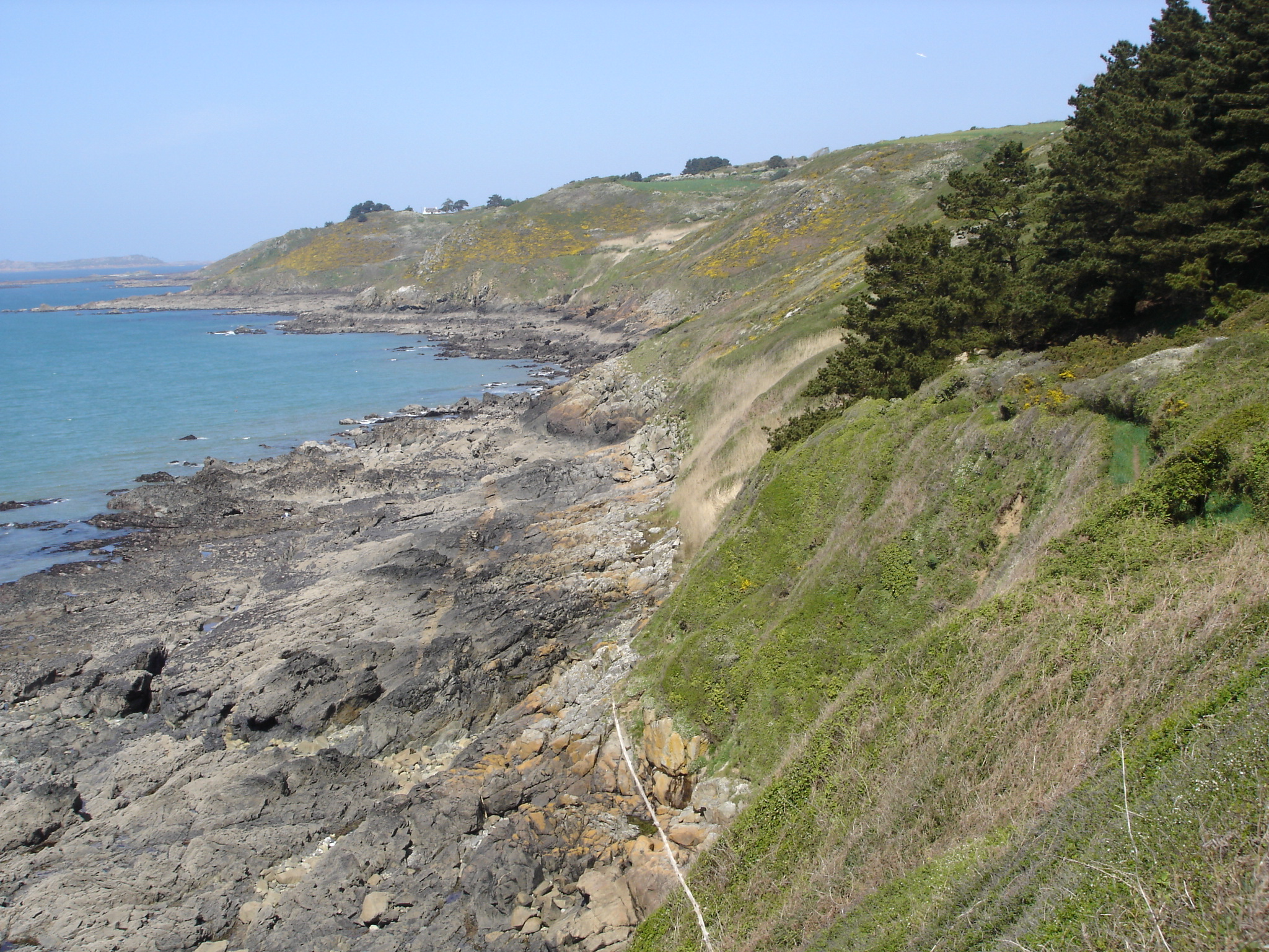 Le chemin côtier à Trédrez.